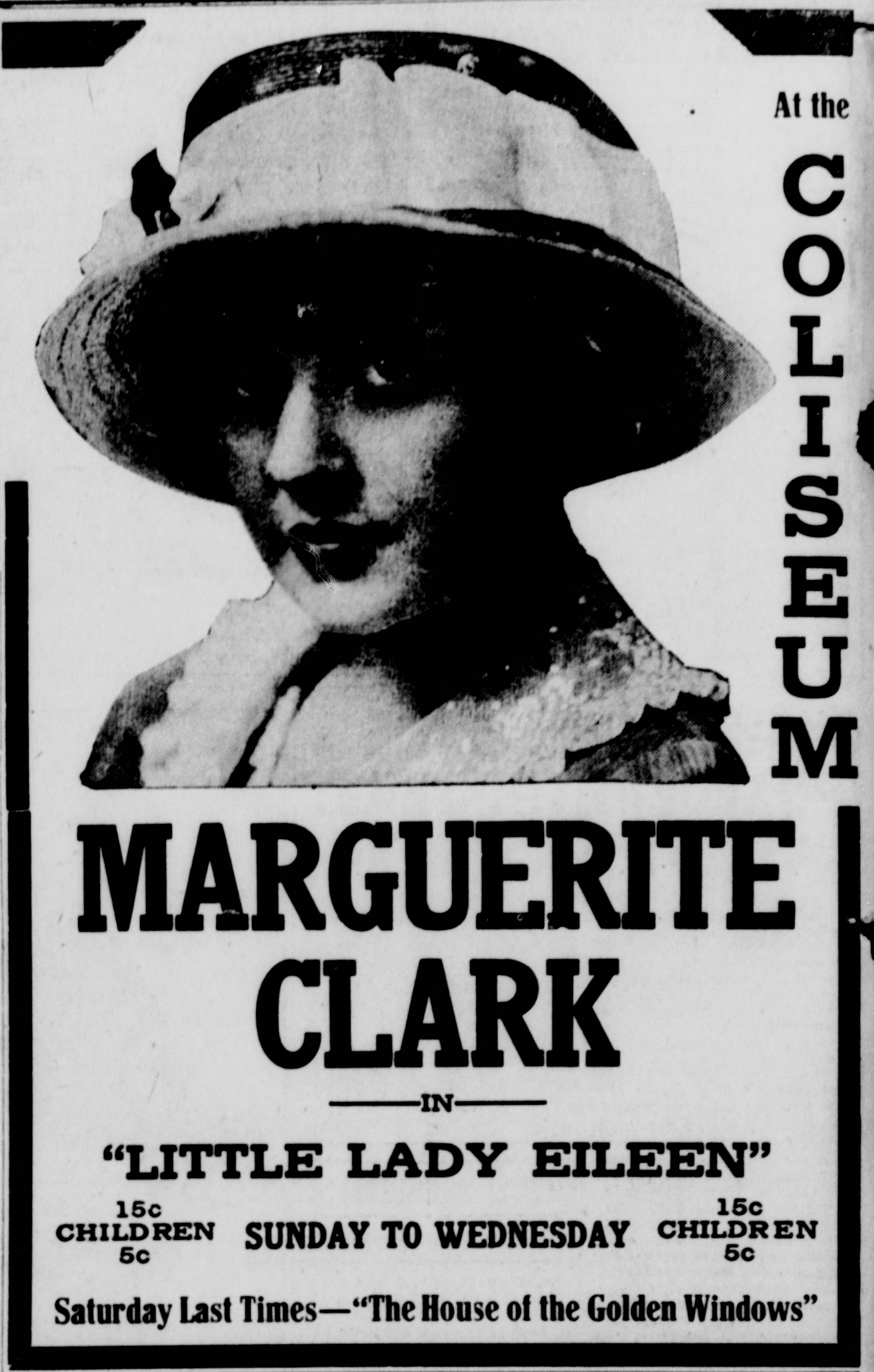 Little Lady Eileen newspaper advertisement